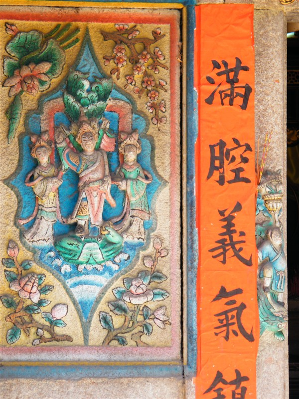 达埠陆厝池关爷宫细部